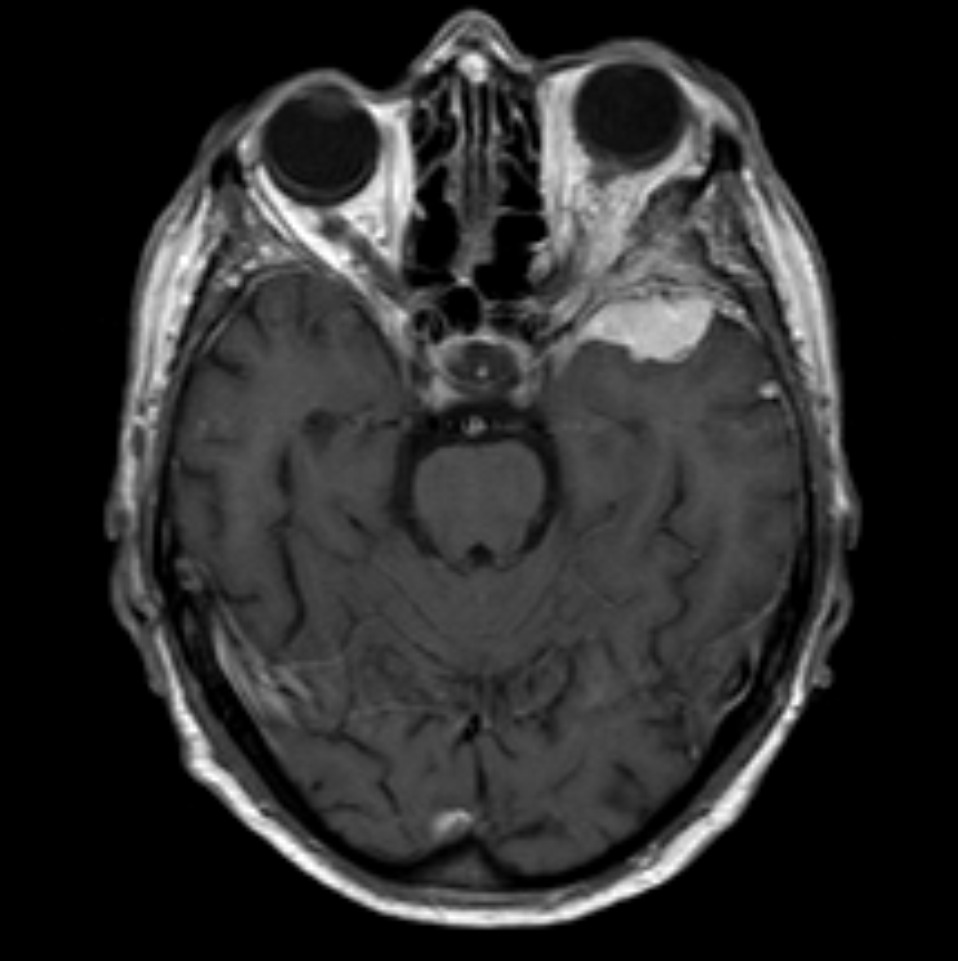 Keilbeinmeningeom in der Computertomographie und Magnetresonanztomographie. Deutliche, homogene Kontrastmittelaufnahme mit 'dural tail' (sagittal gut zu sehen). In der Computertomographie (Knochenfenster und VRT) ist die reaktive Hyperostose besonders gut zu erkennen, die durch die Vorwölbung in die Orbita schon einen Bulbustiefstand bewirkte. Magnetresonanztomographie T1w axial mit Kontrastmittel